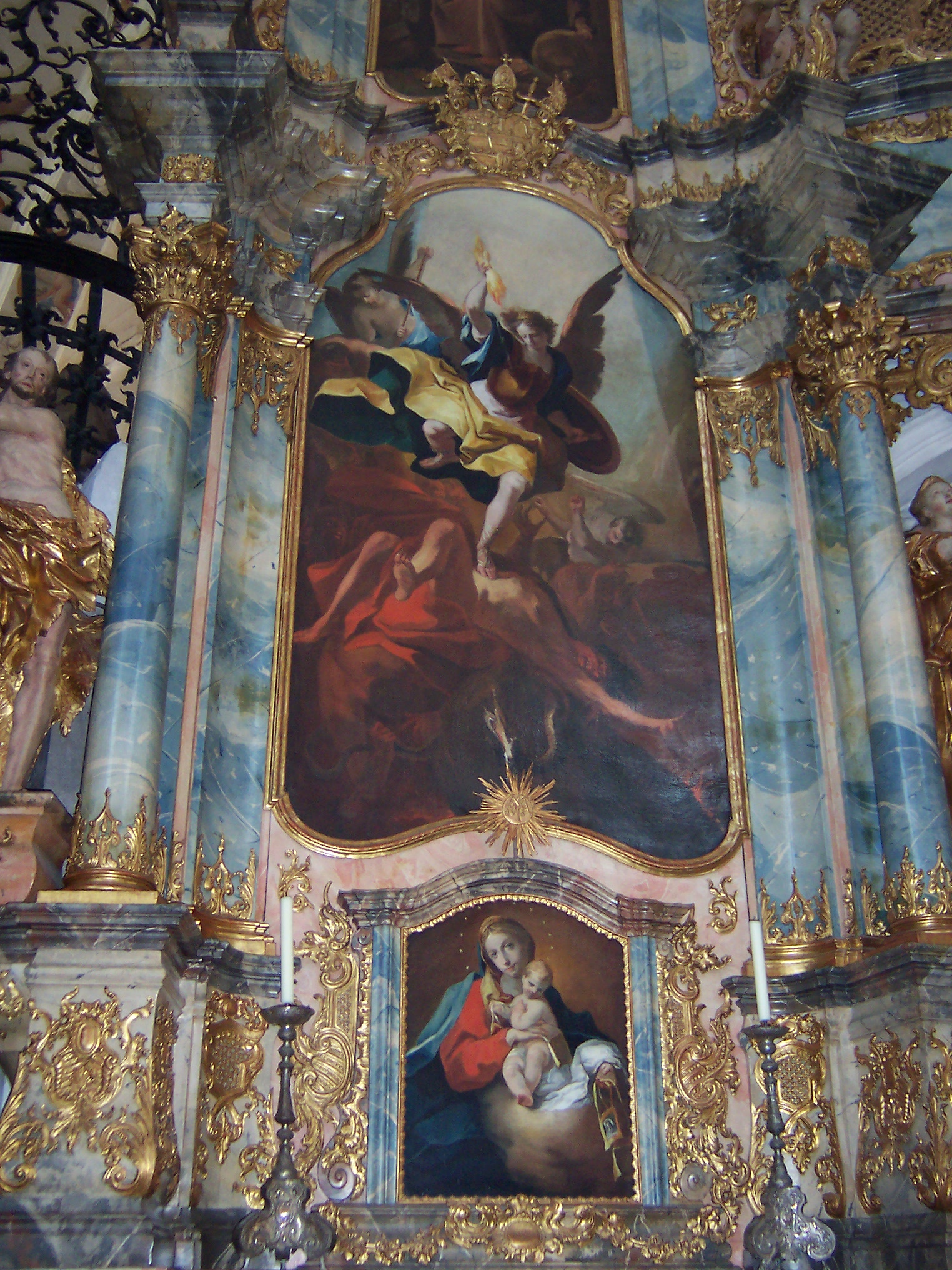 St.Michaels-Altar neben dem Chorgitter an der Epistelseite (rechts). Klosterkirche in Muri, Kanton Aaargau, Schweiz.